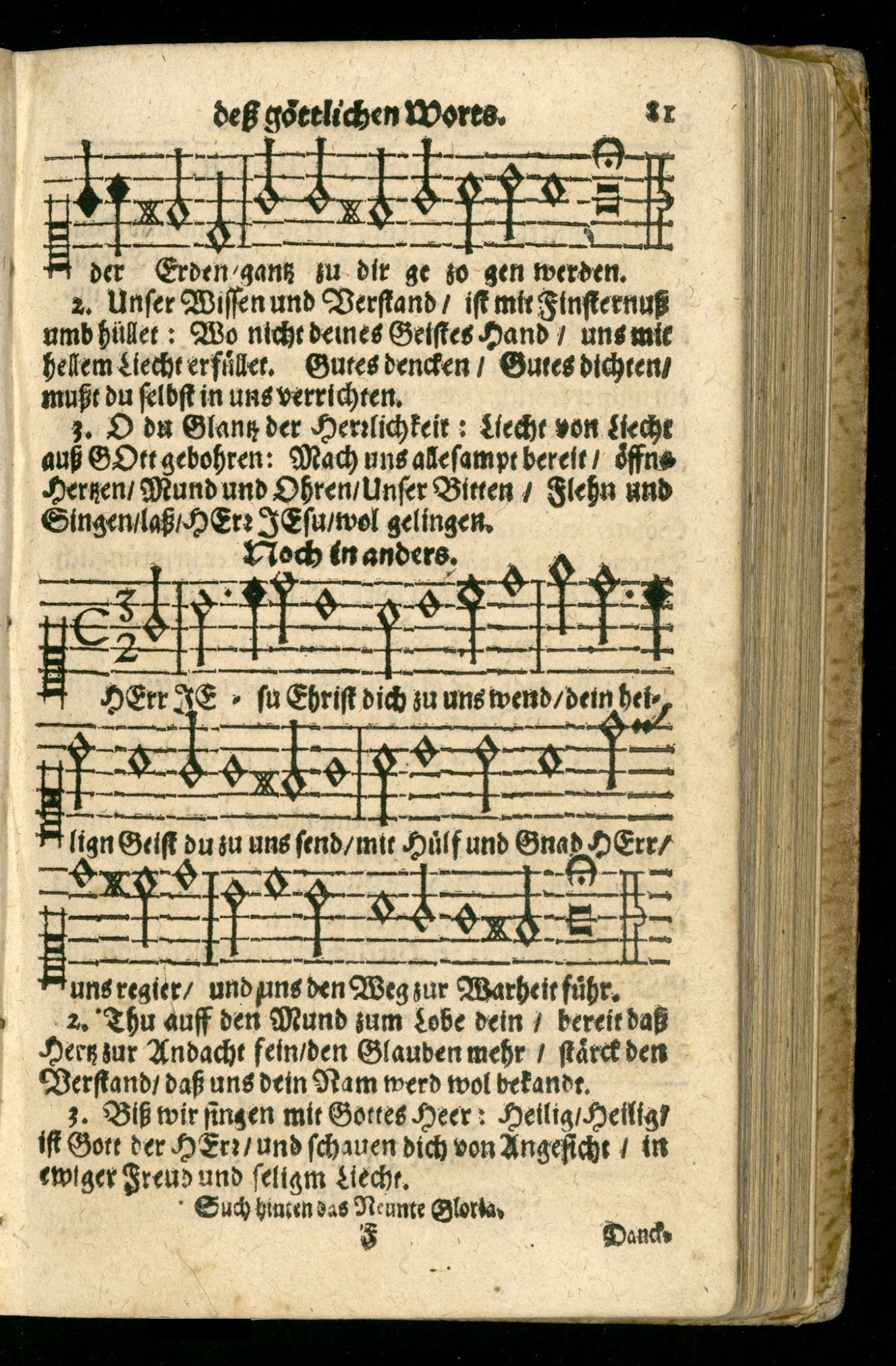 The hymn Herr Jesu Christ, dich zu uns wend in the Neu-vermehrtes Würtembergisches Gesangbuch of Daniel Speer and Johann Habermann